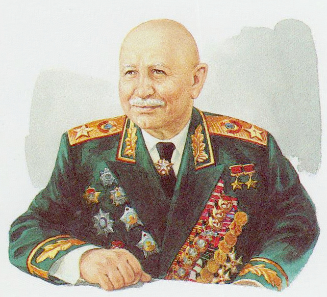 ПК с ОМ МАРШАЛ БАГРАМЯН 2 СГ ДЕНЬ ПОБЕДЫ И МУЗЕЙ ЗАПОВЕДНИК СТАЛИНГРАДСКОЙ БИТВЫ ВОЛГОГРАД